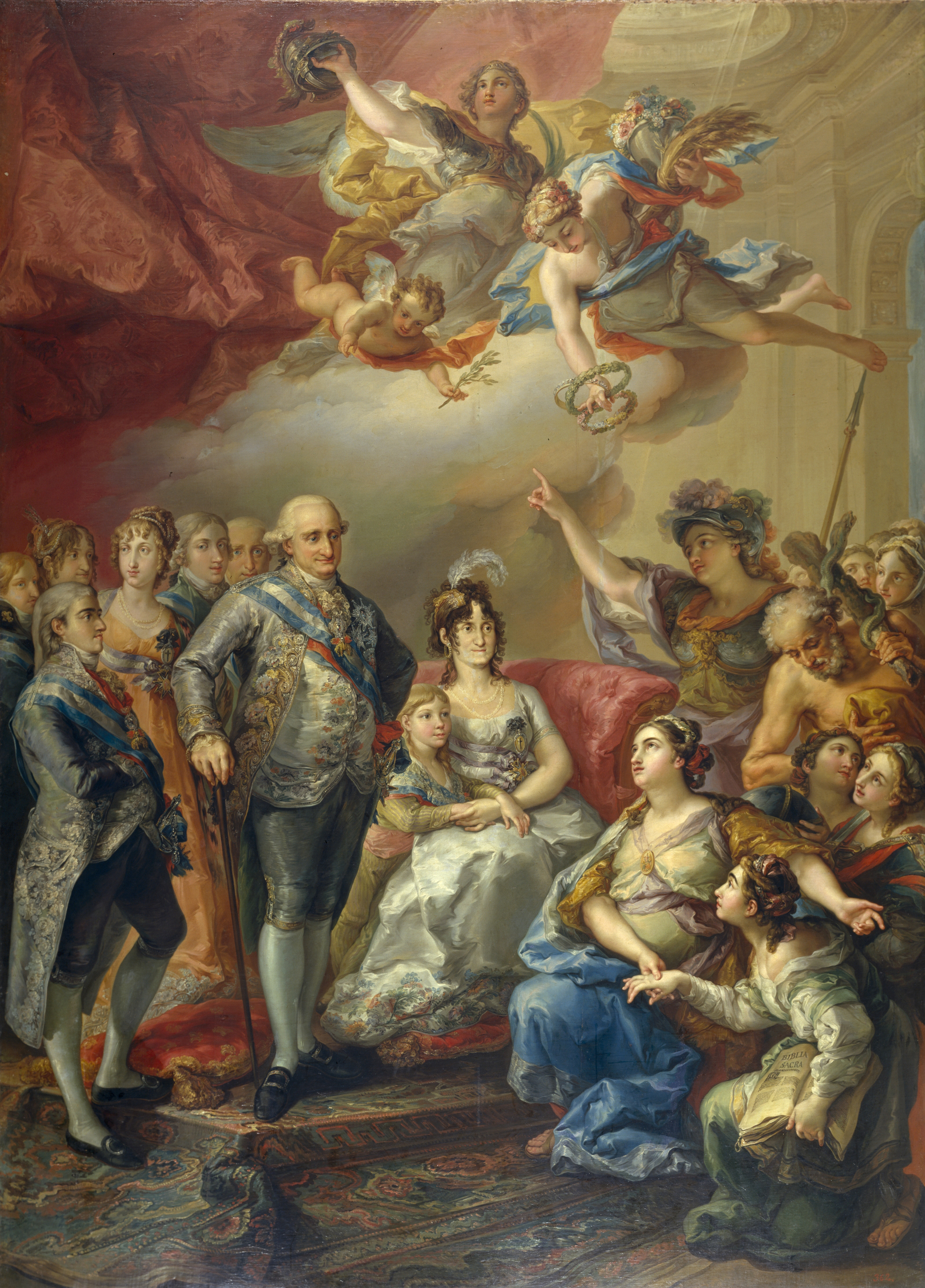 En el grupo izquierdo en primer plano: Fernando (VII), su esposa María Antonia de Borbón-Dos Sicilias, Carlos IV, María Luisa de Parma y el pequeño Francisco de Paula. Atrás: Carlos María Isidro de Borbón, María Luisa de Borbon, Luis de Etruria y Antonio de Borbón.